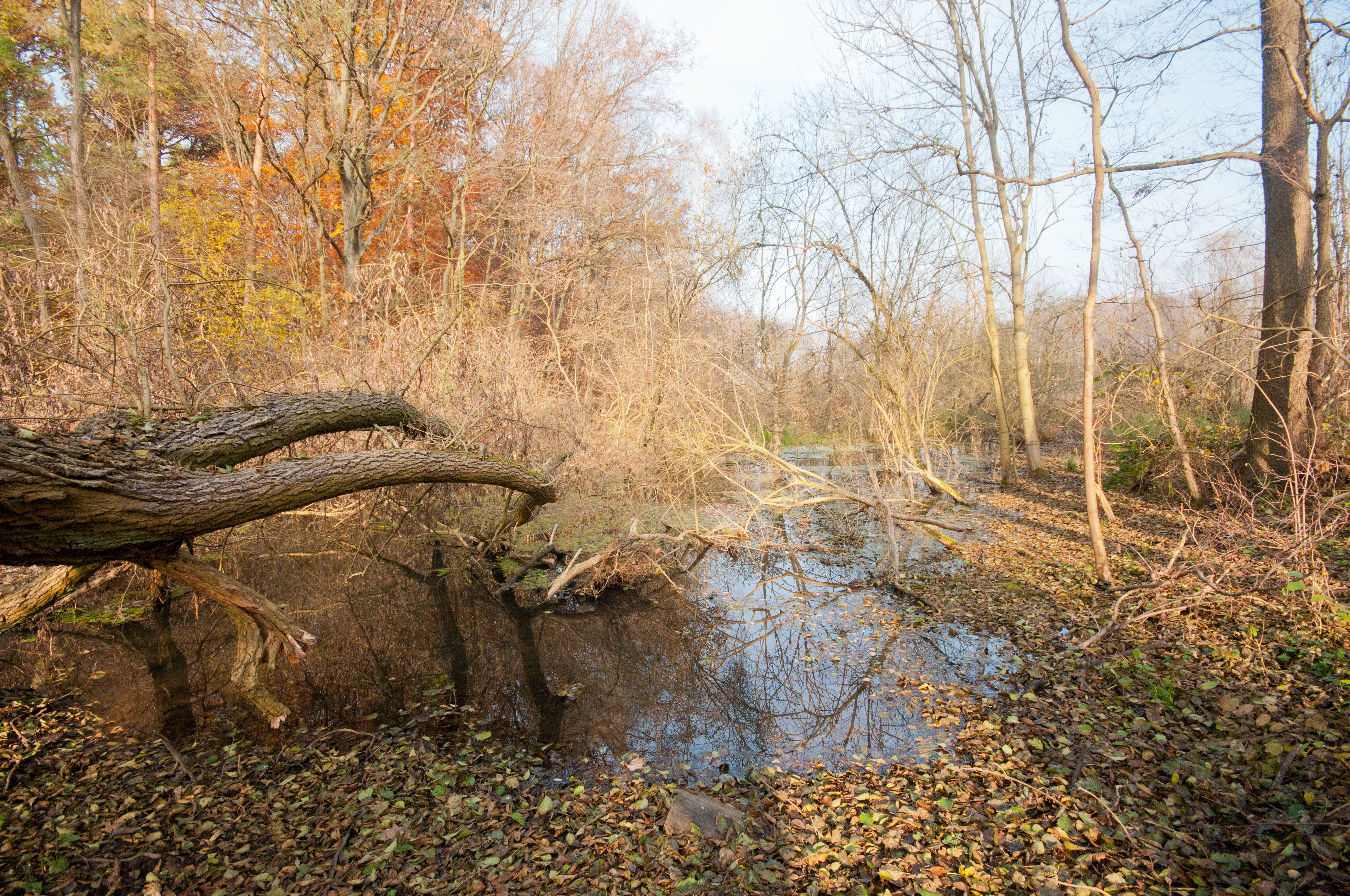 Ragöse in Höhe Sandkrug Ragöse an der Stelle, wo wahrscheinlich früher die gleichnamige Mühle gestanden hat